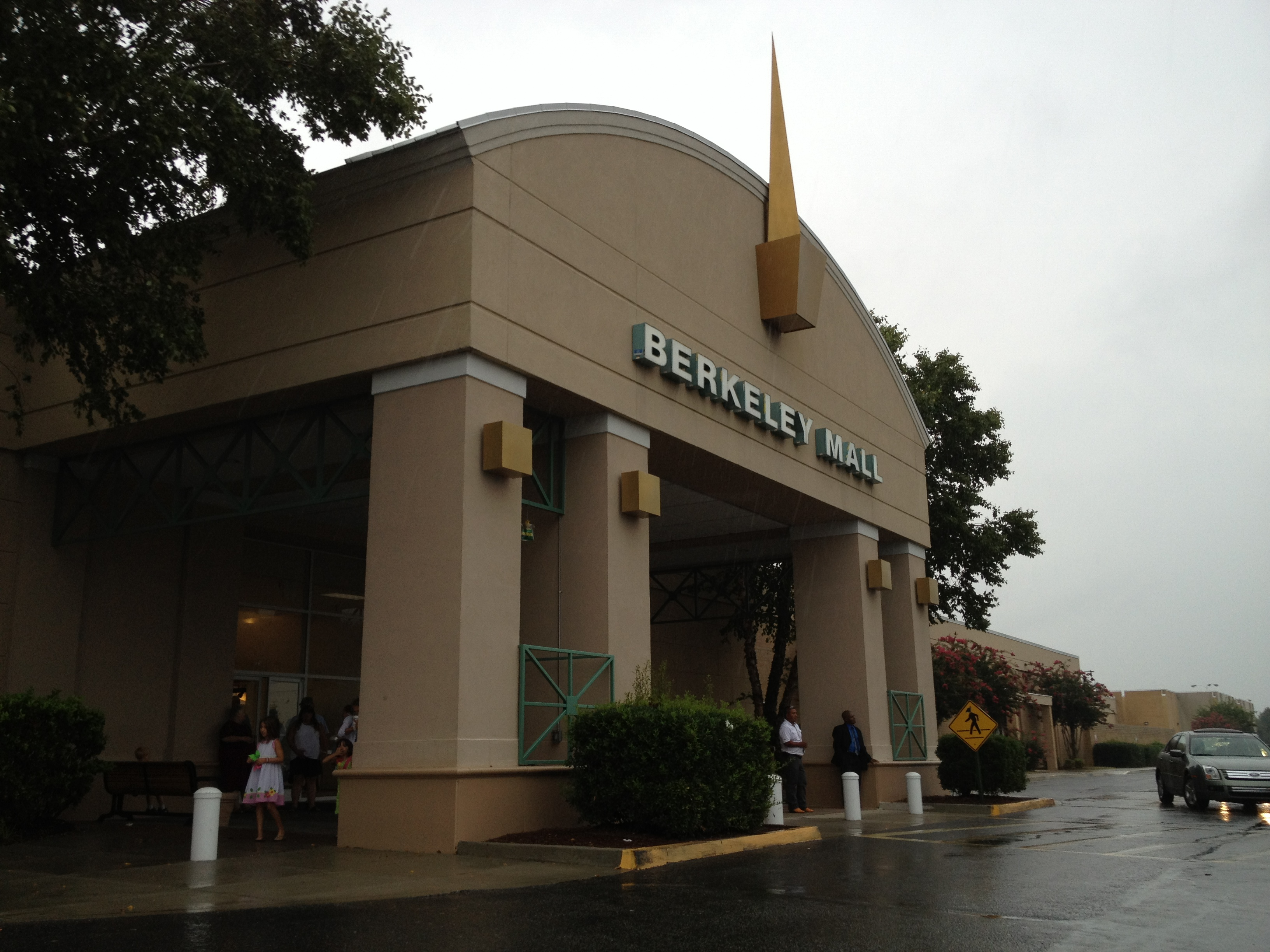 Berkeley Mall